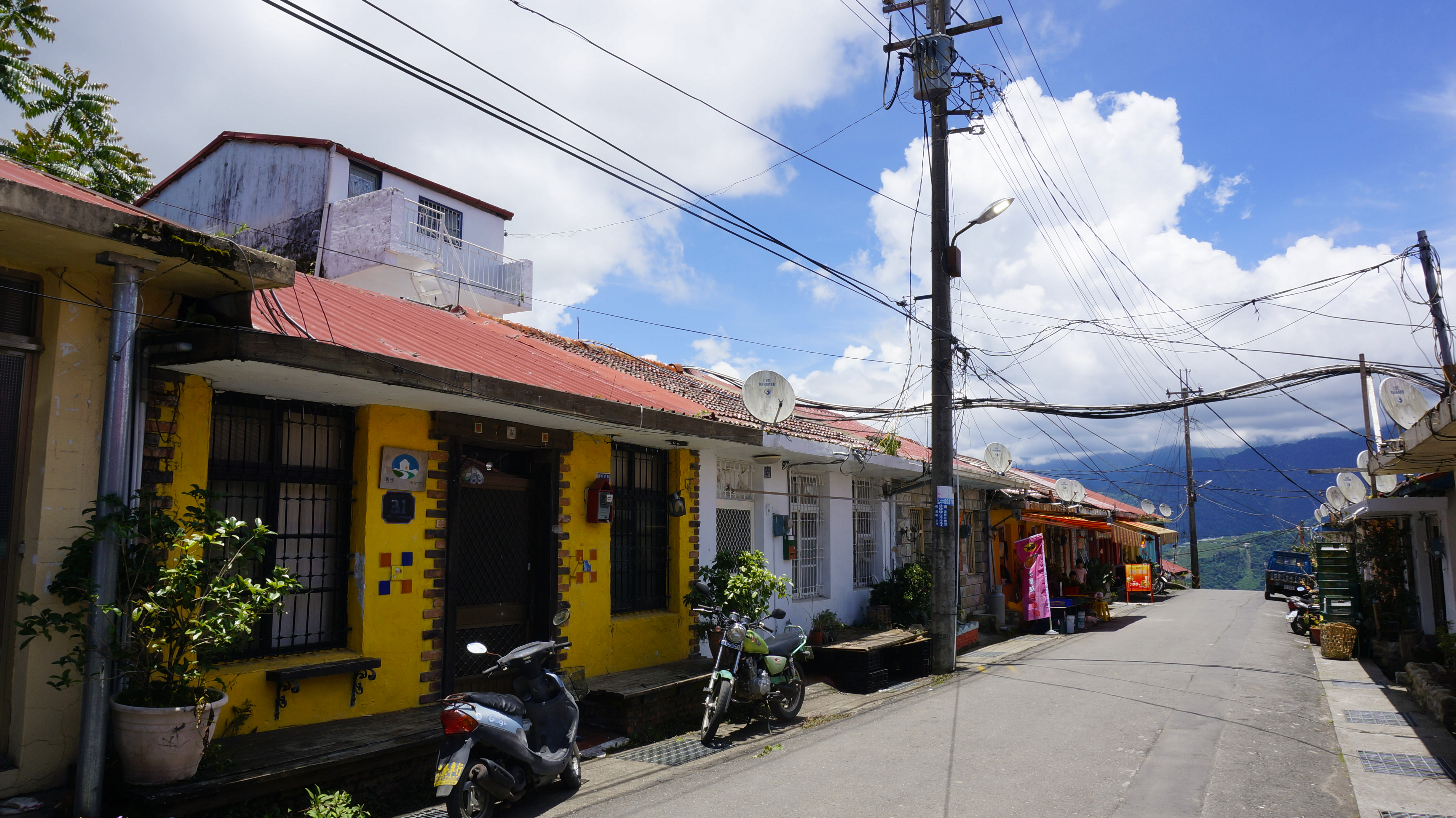 中文（台灣）: 清境博望新村